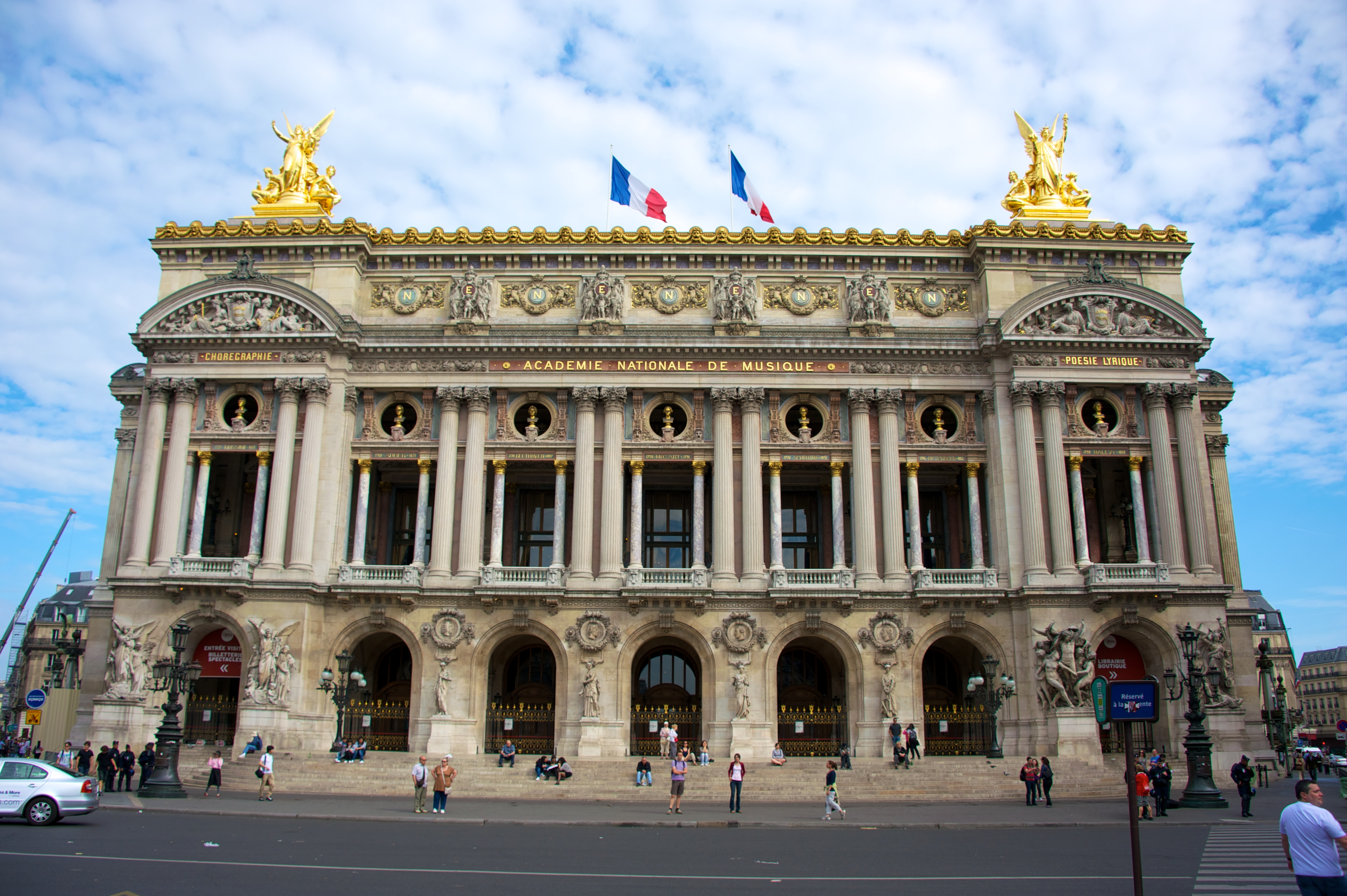 Facade of Opéra Garnier, Paris, France.